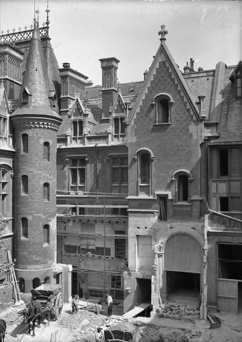 Travaux cour intérieure - Courtyard works - 1921 Hôtel Gaillard, situé Place du Général Catroux à Paris.